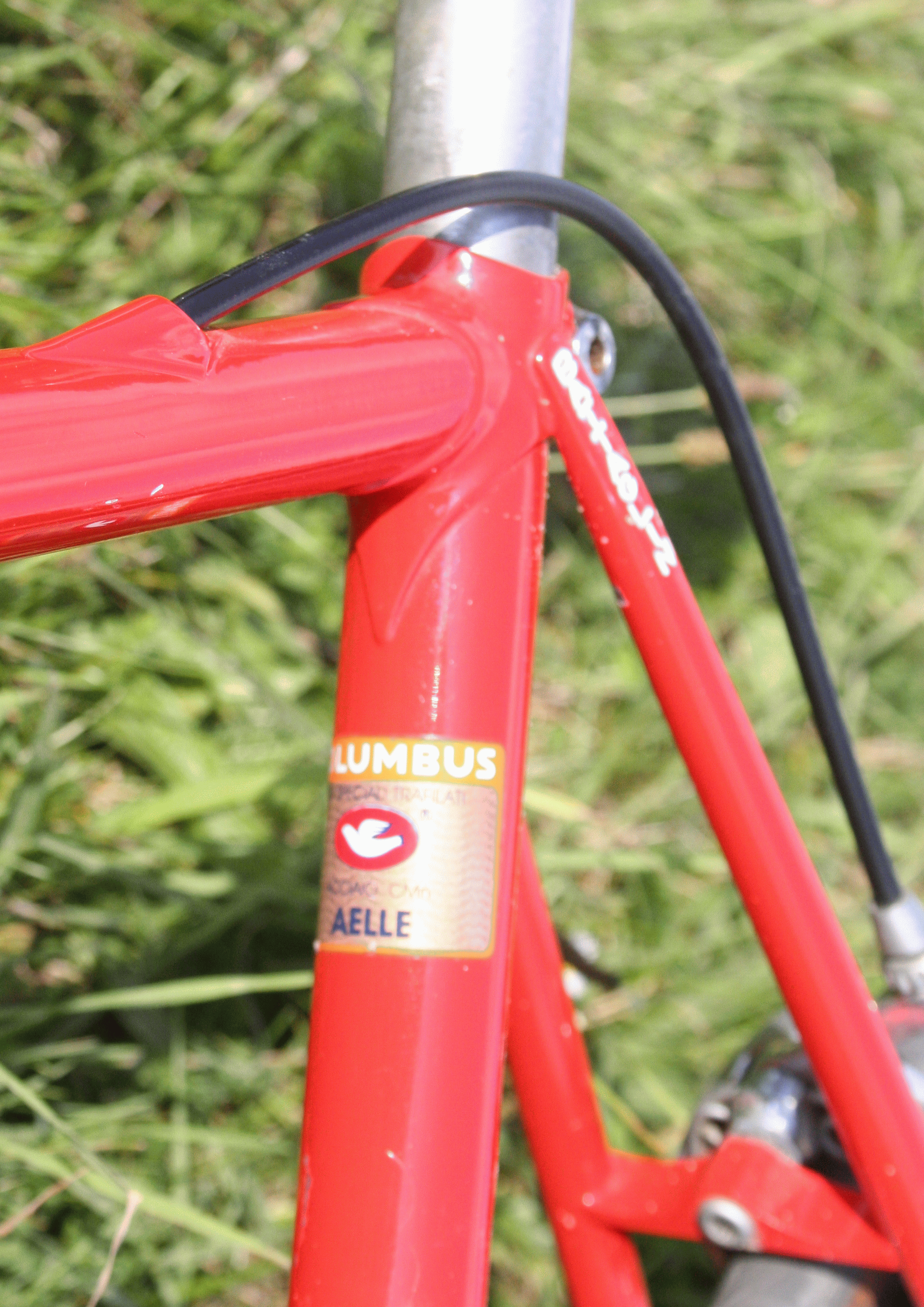 Columbus Tubi "Aelle" Label at Battaglin Racecycle